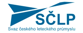 Logo SČLP